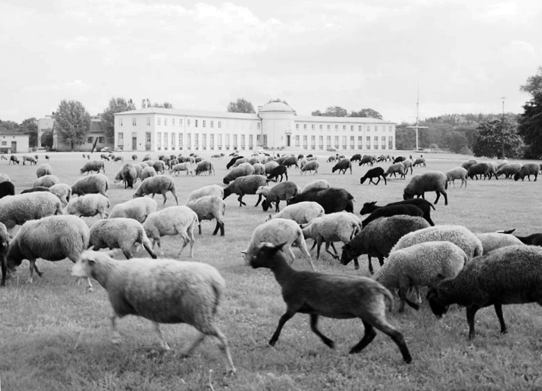 "Kungens får" på bete vid Sjöhistoriska museet.